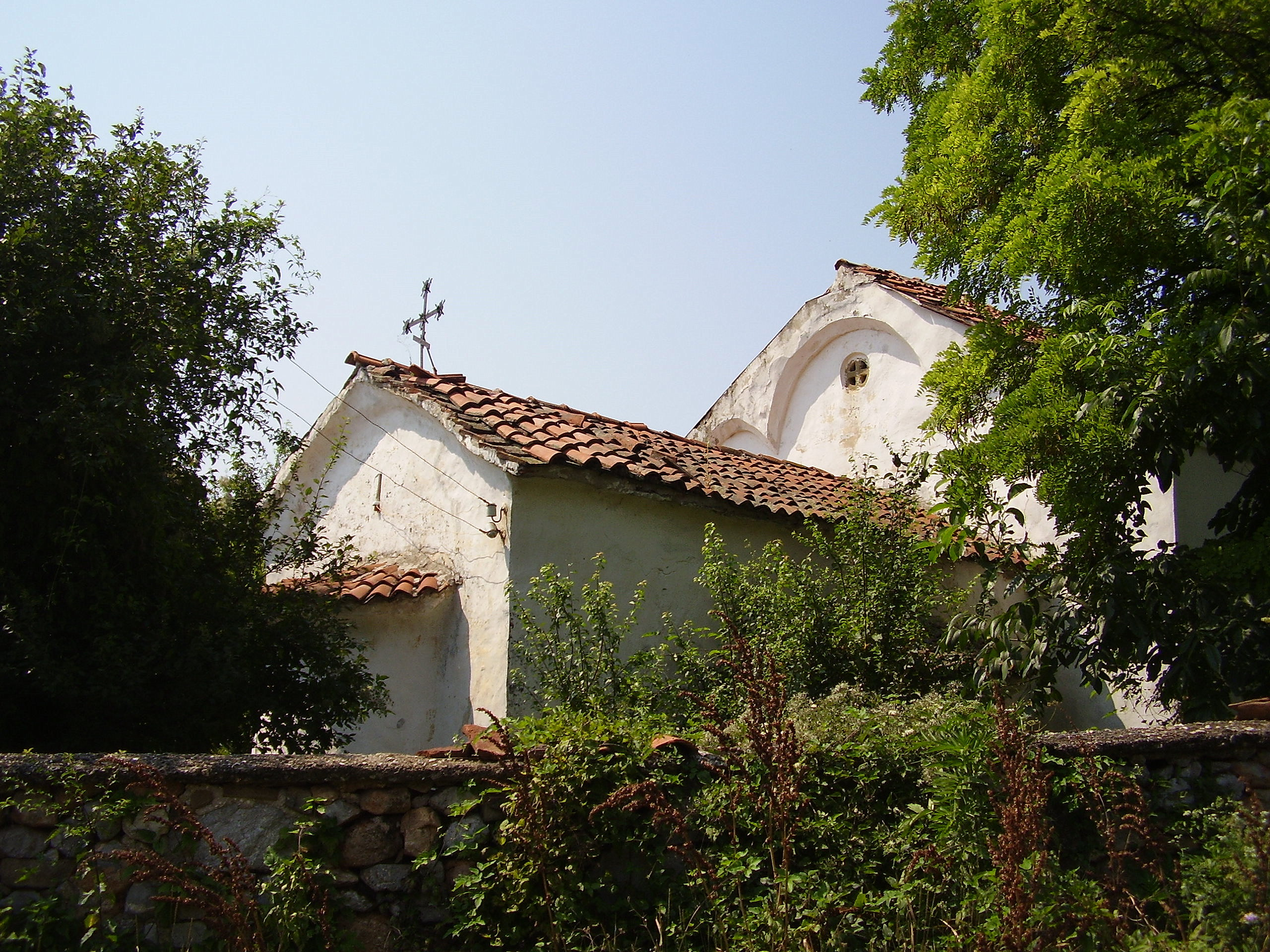 Църквата "Света Петка" в с.Таваличево, община Кюстендил